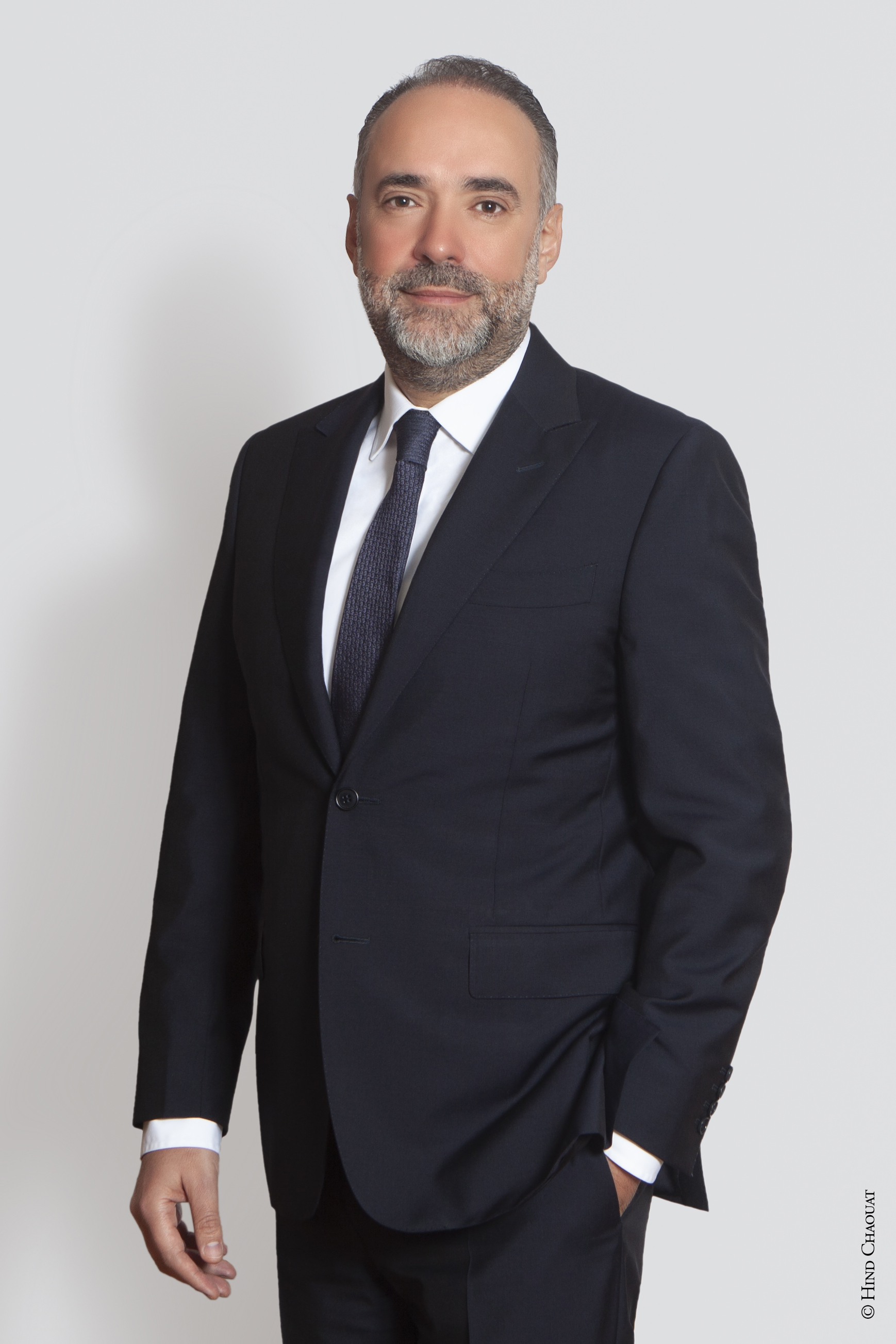 photo de Kamal Mokdad